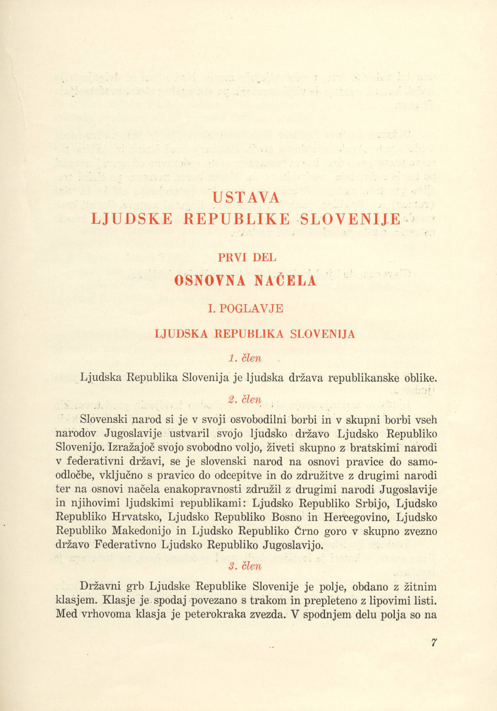 Ustava Ljudske Republike Slovenije